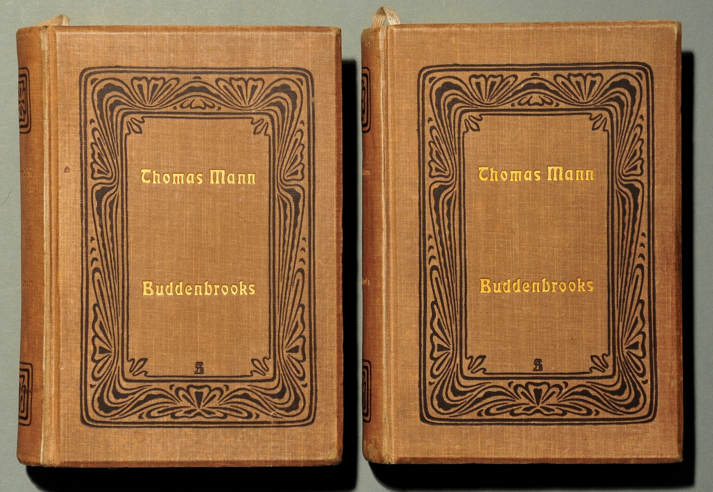 Thomas Mann: Buddenbrooks. Verfall einer Familie. Roman. [1] Berlin: S. Fischer 1901, 2 Bde., 566 + 539 Seiten; Erstausgabe (Potempa [2] D 1, Bürgin I 2, Wilpert/Gühring² 3). Orig. – Leinen 18,5 x 13 cm. Titel und Autor in Goldprägedruck auf Vorderdeckel und Rücken, Kopfgoldschnitt. Jugendstildekor in schwarzem Prägedruck auf Vorderdeckel und Rücken, Verlagssignet in schwarzem Prägedruck auf dem Hinterdeckel.